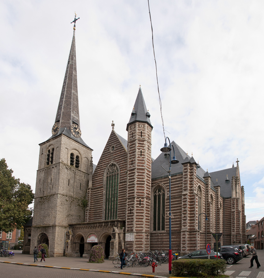 De Parochiekerk van Sint Martinus te Kontich